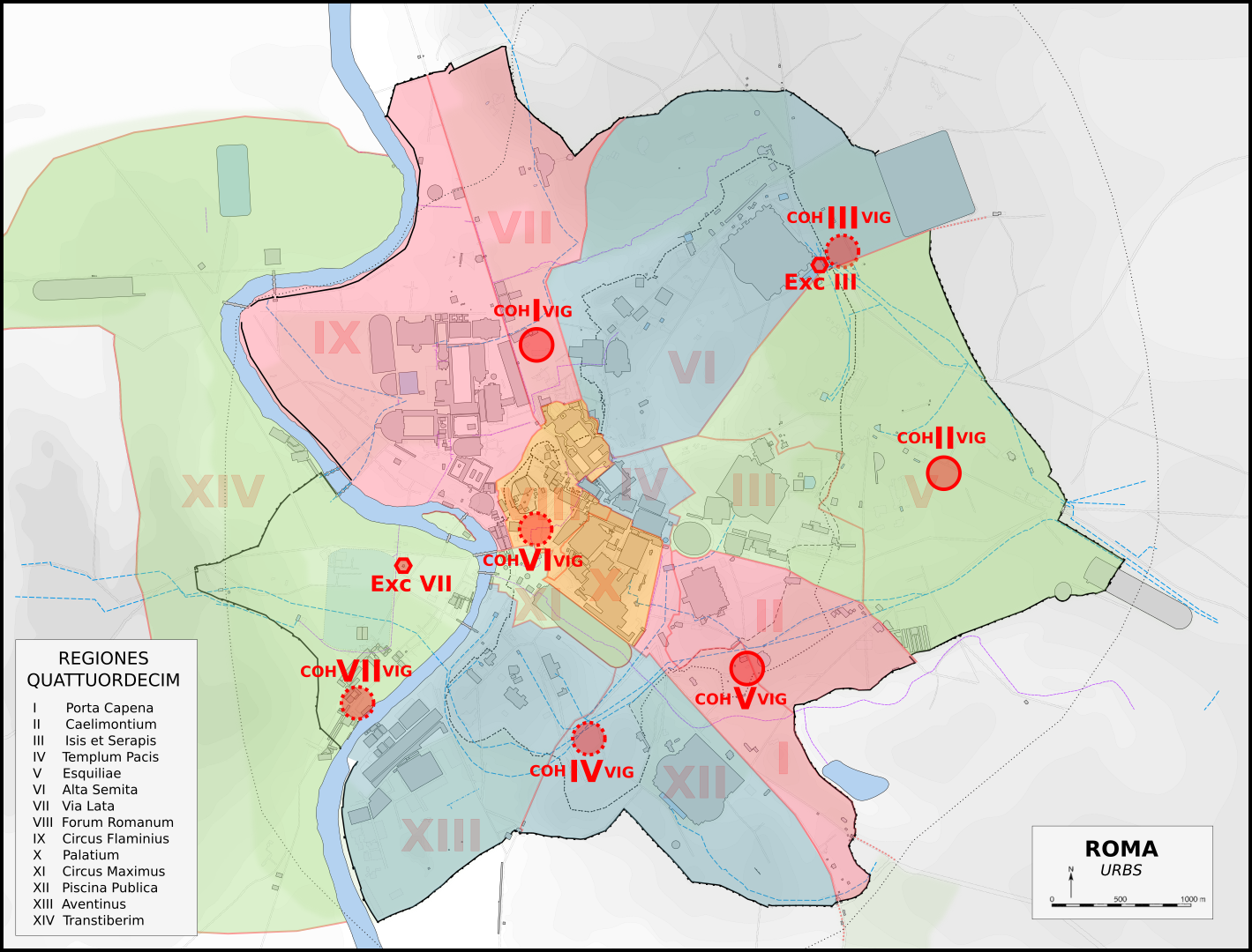 Plan de la Rome antique où figurent les principaux monuments construits depuis la fondation de la ville jusqu'au VIème siècle ap. J.-C., les délimitations des quatorze régions augustéennes, la localisation des casernes et excubitoria des sept cohortes de vigiles urbains ainsi que leurs aires placées sous leur surveillance respective. Fond de carte d'après Rodolfo Lanciani, Forma Urbis, complété et corrigé avec les propositions et découvertes archéologiques plus récentes. Localisation et zones d'influence d'après : Homo, Rome impériale et l'urbanisme dans l'Antiquité, 1971 Cartes de base : Cartes des régions